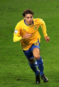 Станислав Резников в составе «Луча-Энергии»